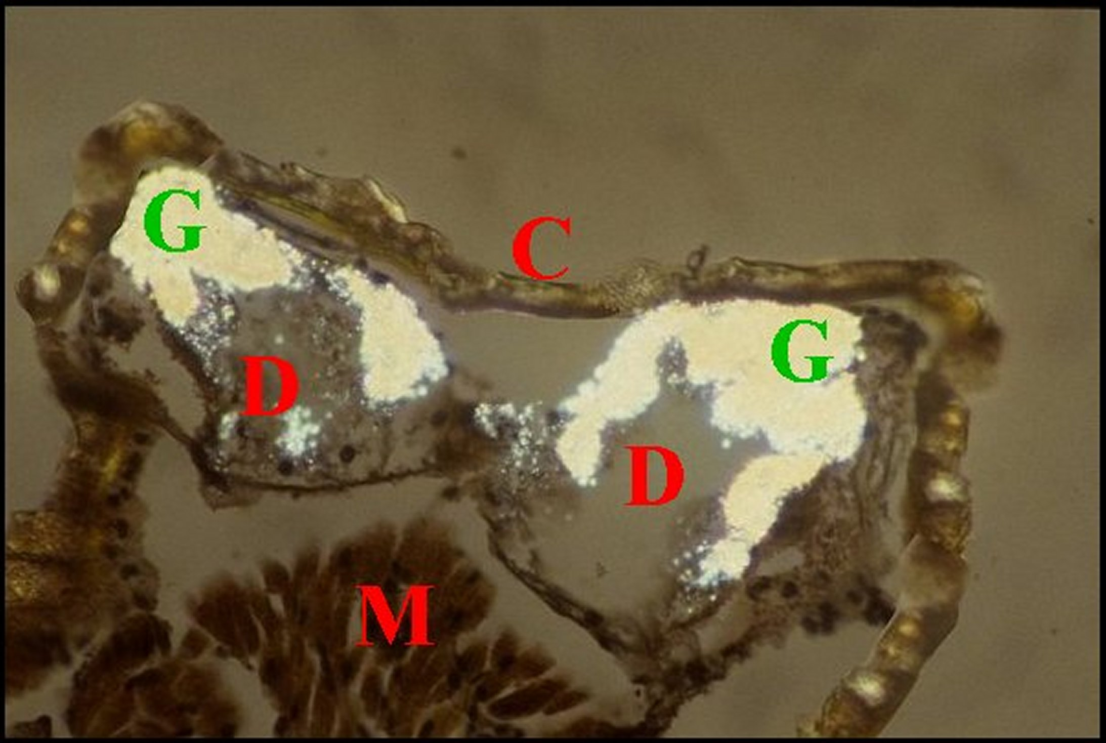 Coupe histologique passant par les deux cornes d'un mâle de Mastophora renfermant des diverticules intestinaux. Vue en lumière polarisée.